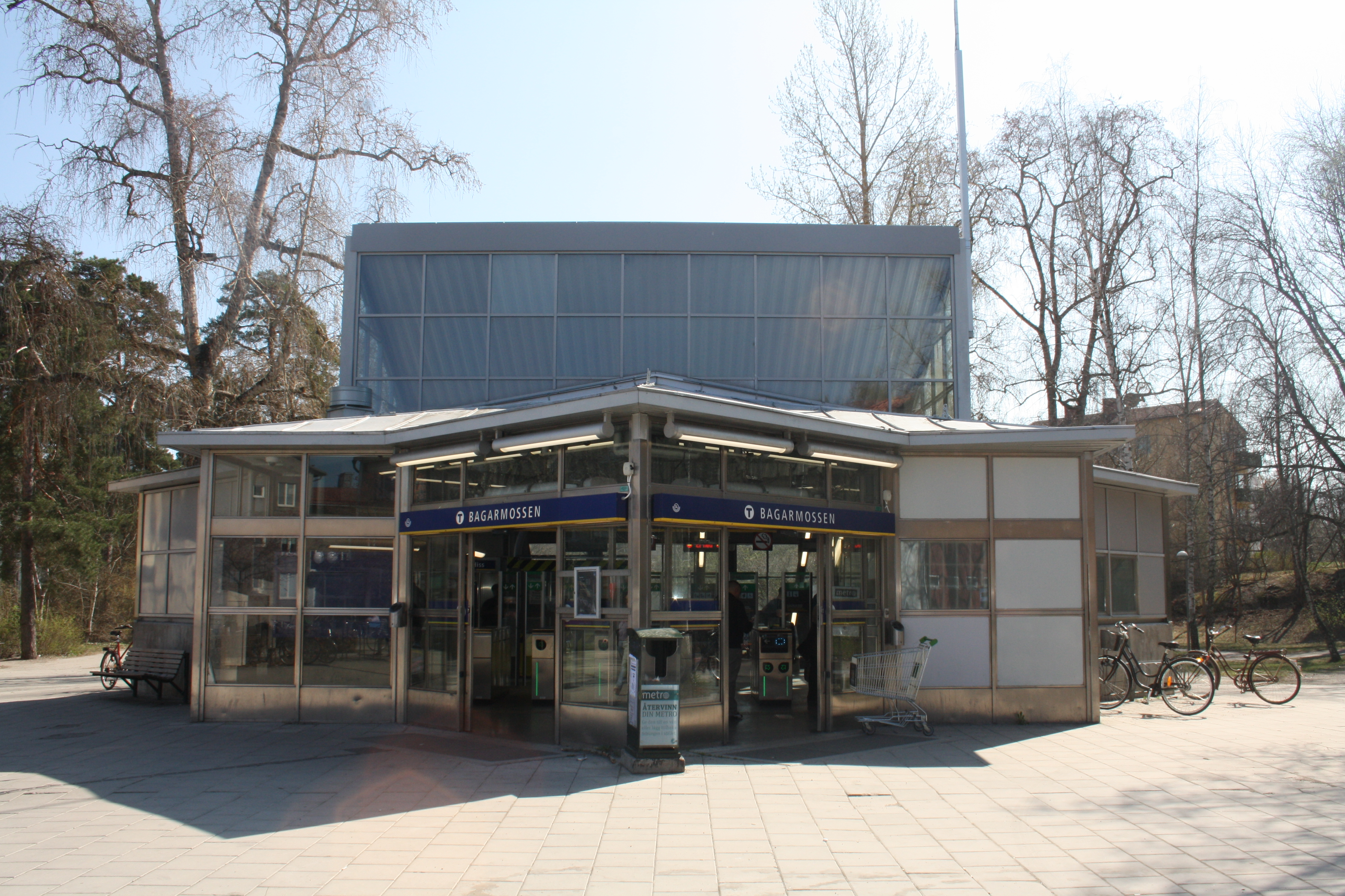 Bagarmossens tunnelbana